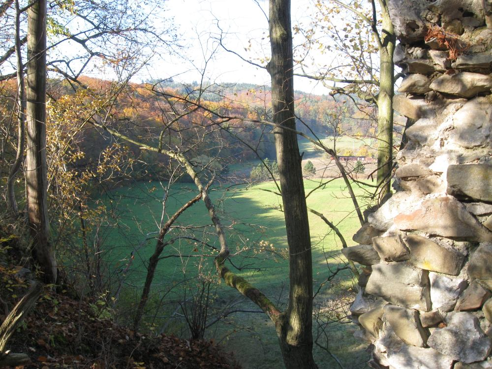 Česky: Zbytky zdí hradu Holštejna, v pozadí louka, kde stávalo do poloviny 16. století podhradní městečko Holštejn